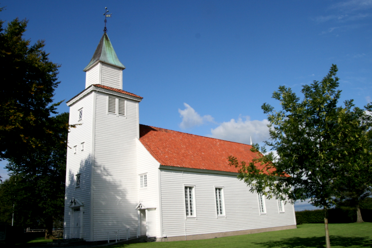 Nærbø gamle kirke